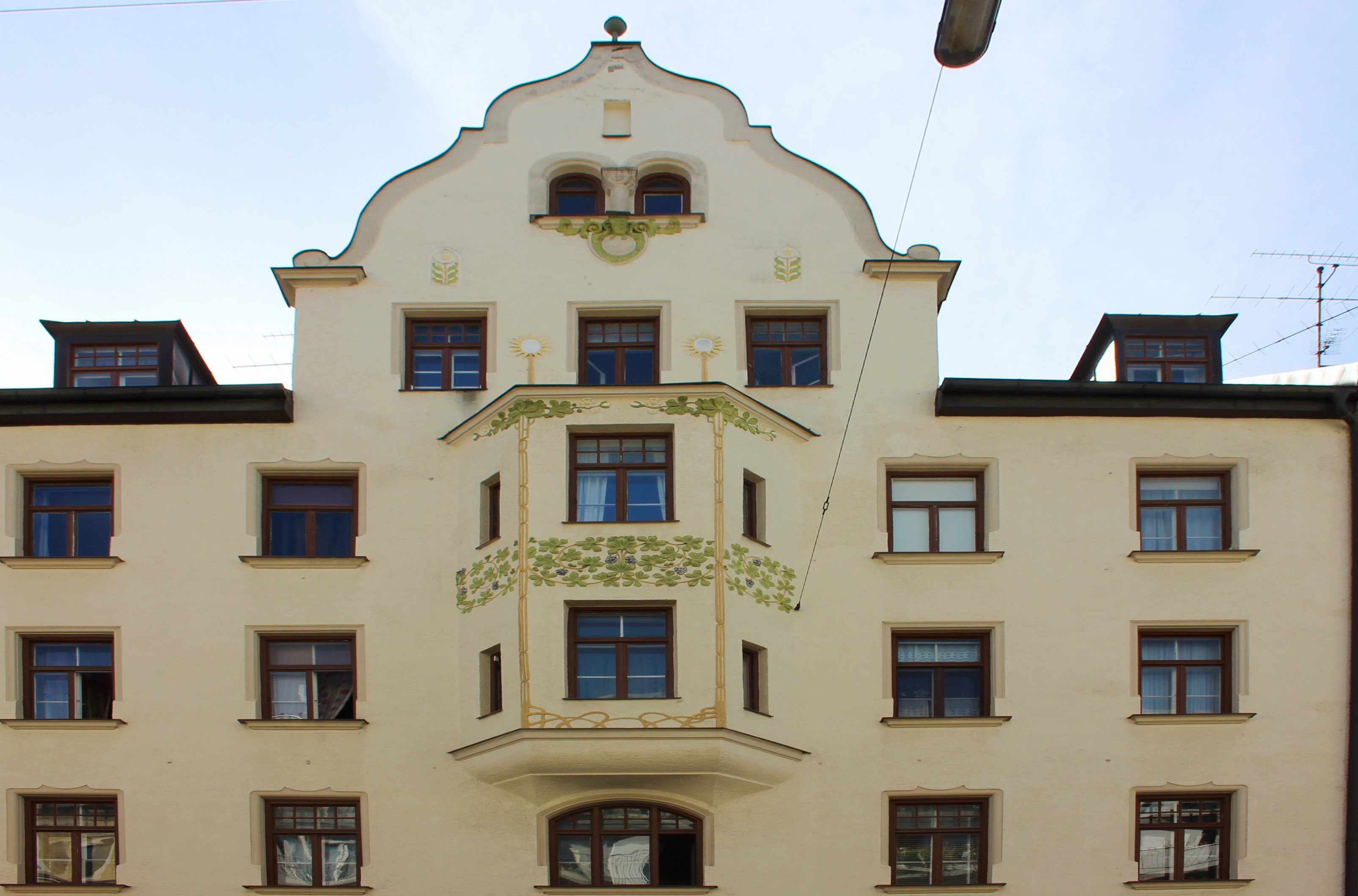 Alramstr. 23 in München. Mietshaus deutsche Renaissance mit Jugendstildekor, 1903–04 von Philipp Avril; bildet mit den Nrn. 21 und 25 eine Gruppe.